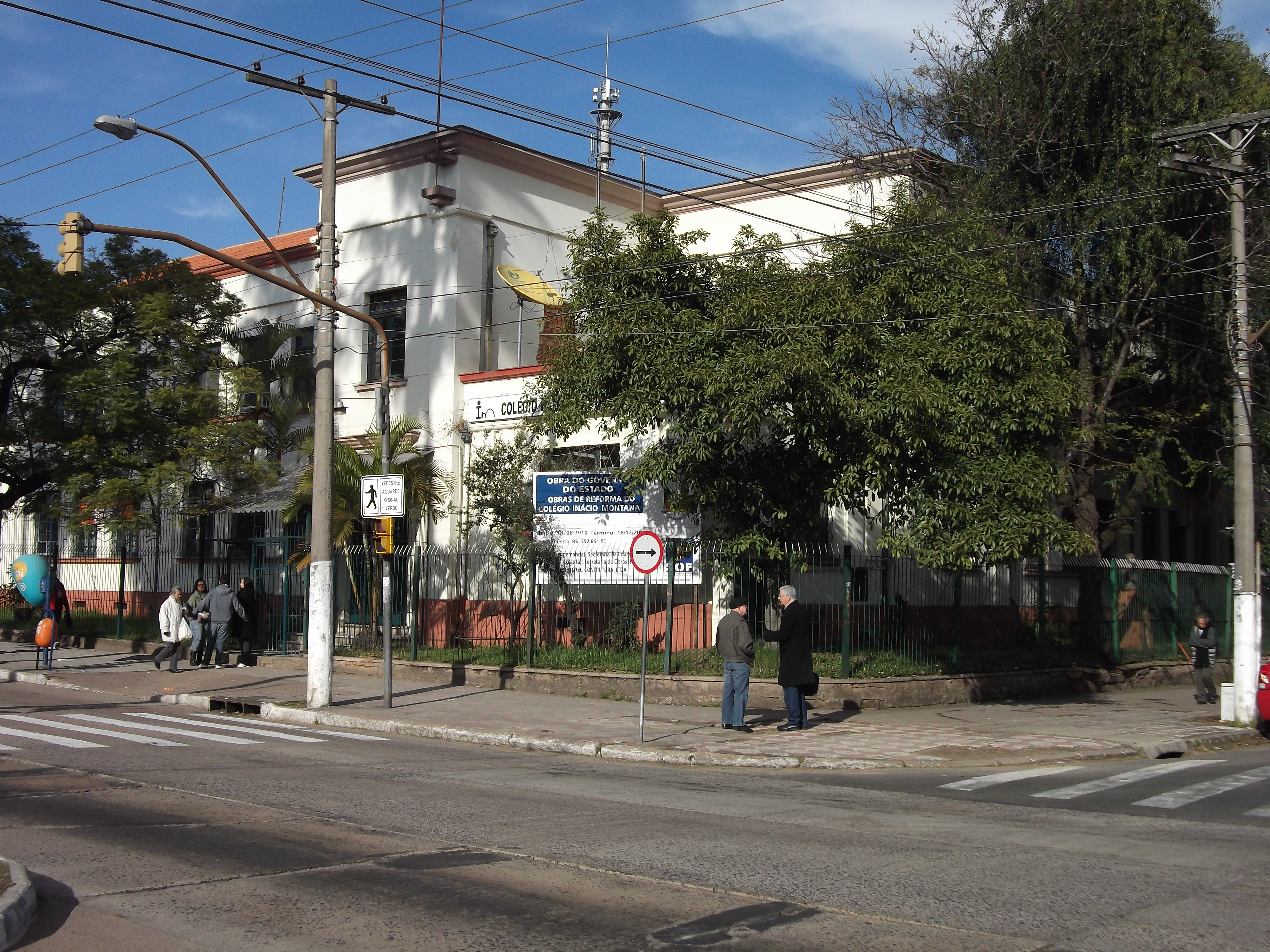 Colégio Estadual Inácio Montanha, Porto Alegre, Brasil. Localizado no bairro Azenha.